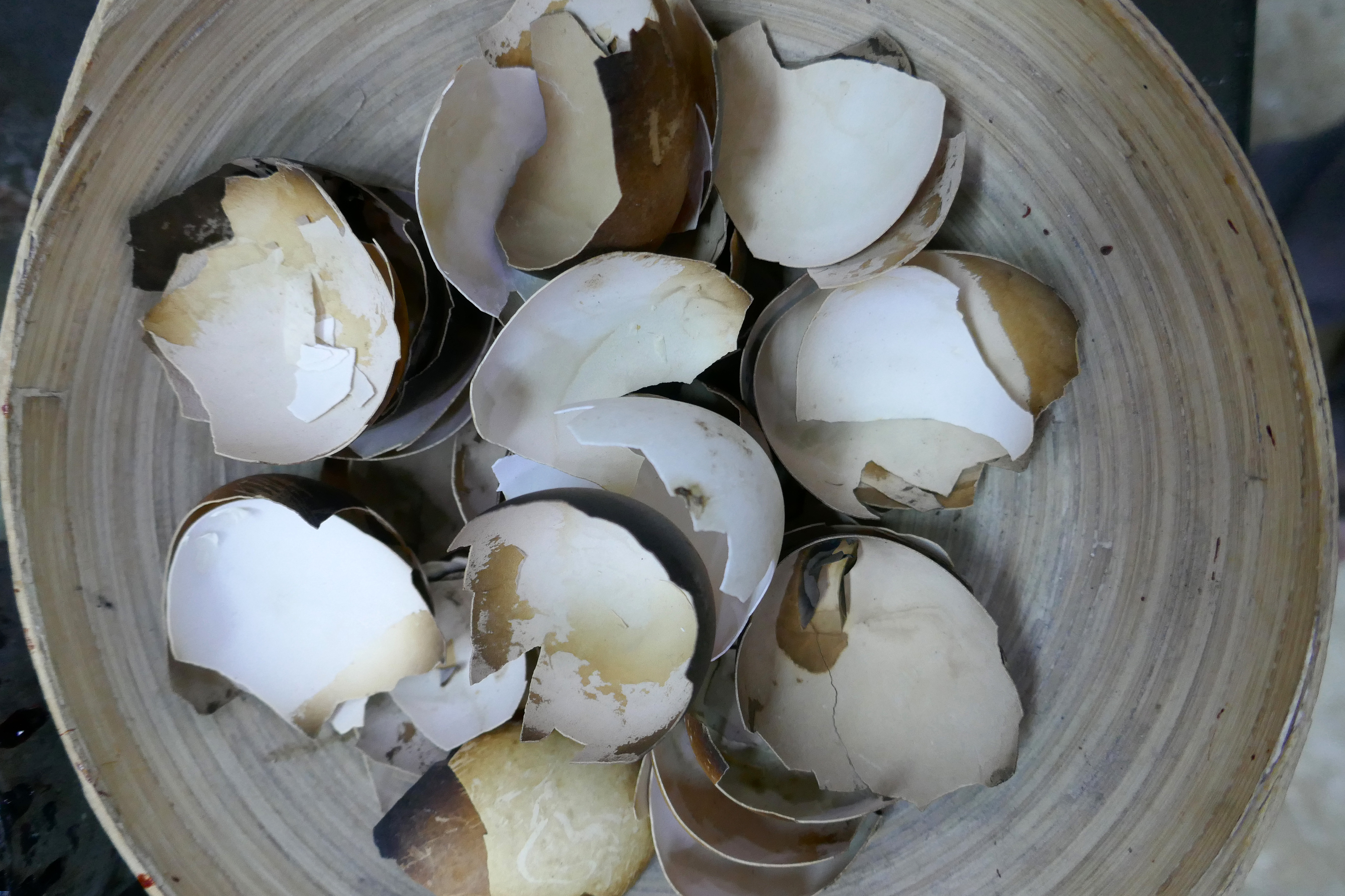 Art traditionnel vietnamien dans un atelier de Hanoi : incrustation de fragments de coquilles d'oeufs dans la laque.